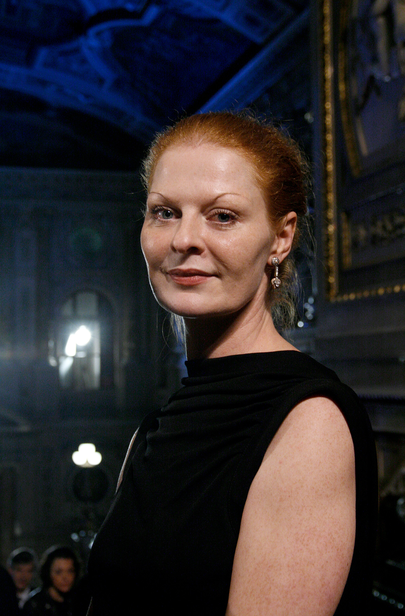 Christiane von Poelnitz, nominiert als beste Schauspielerin, bei der Verleihung des Nestroy-Theaterpreises 2010 im Burgtheater in Wien.